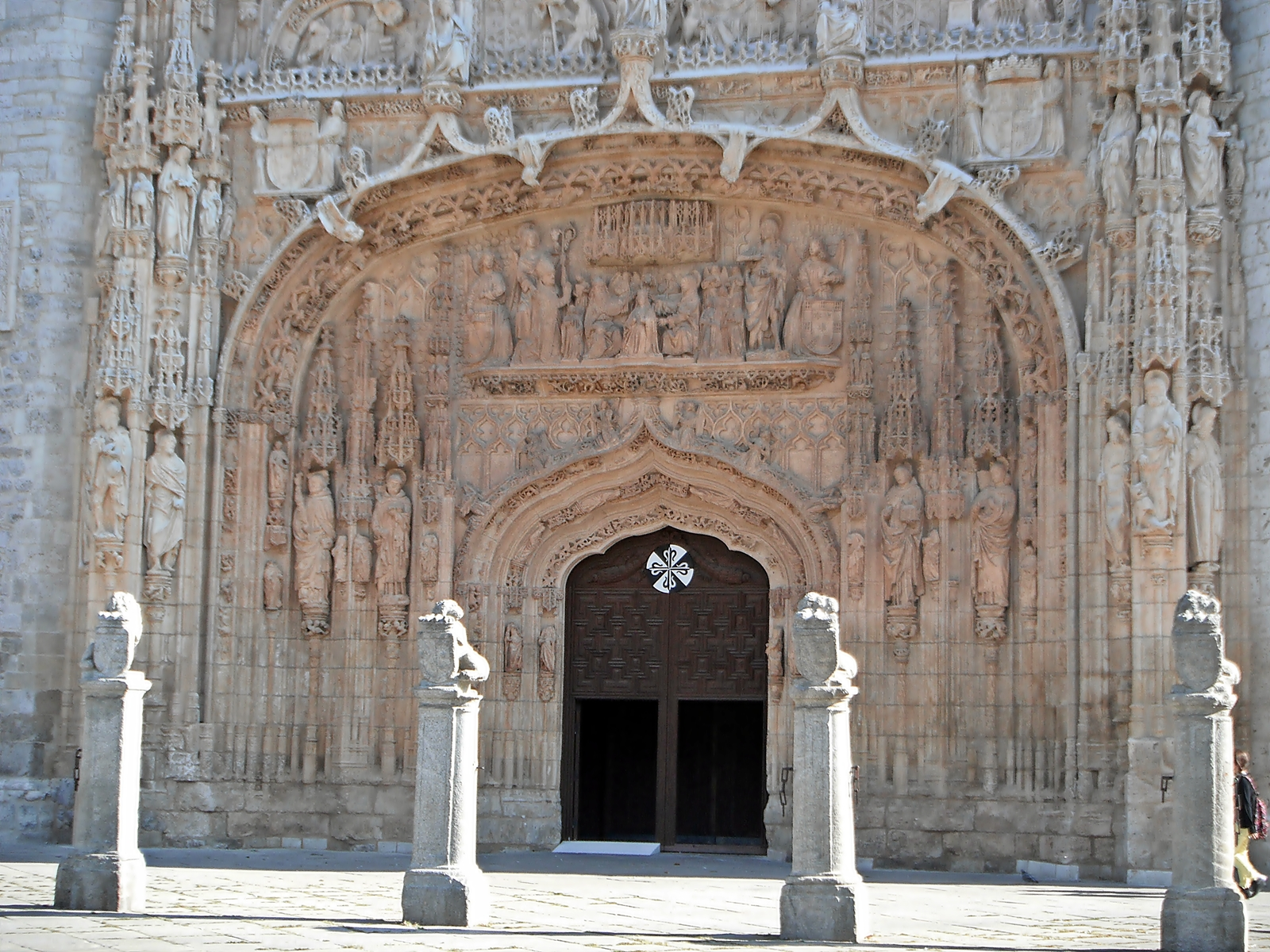 Iglesia conventual de San Pablo (Valladolid)